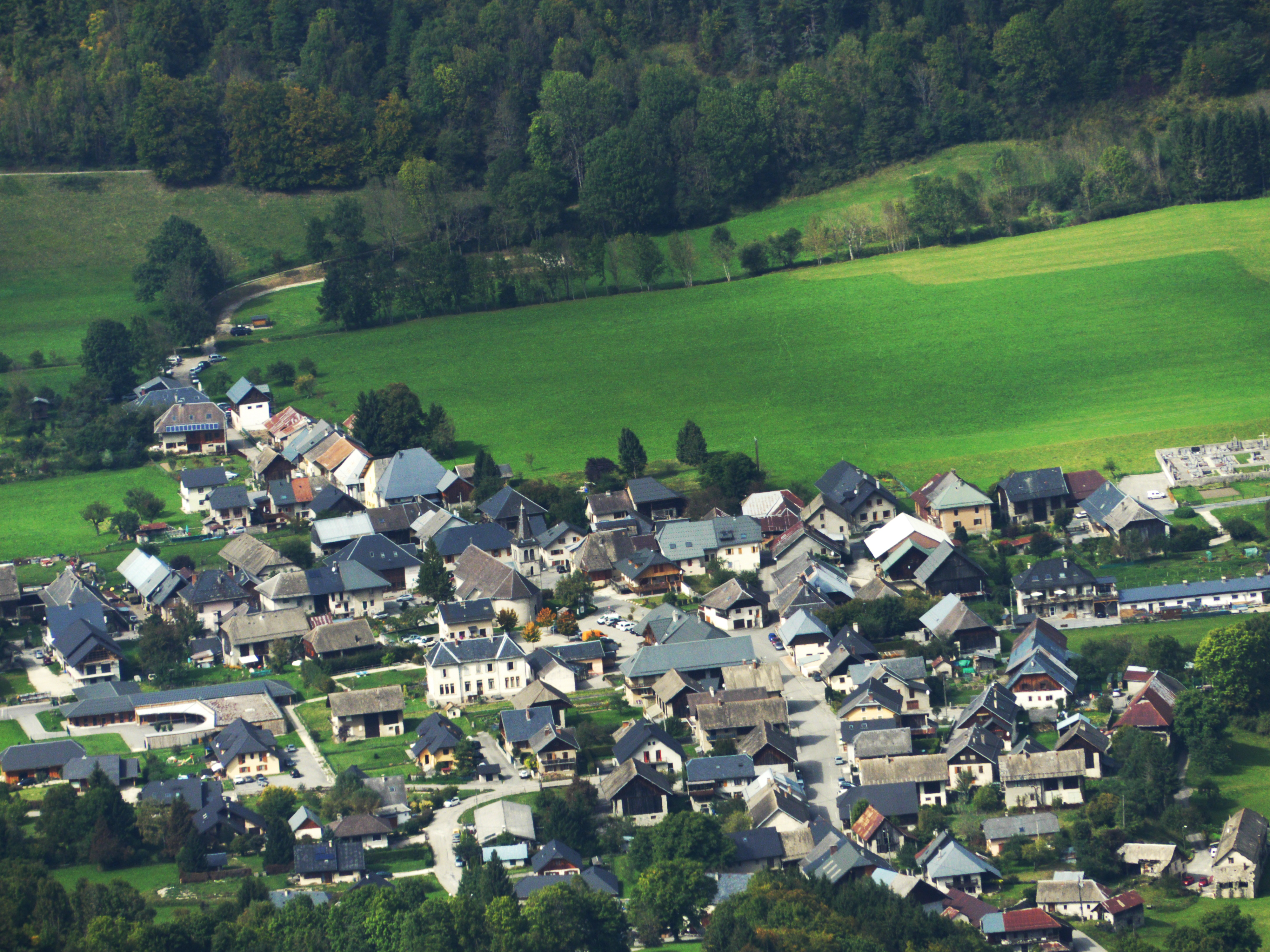 Vue du village d’École (Savoie) à partir du Mont Pécloz